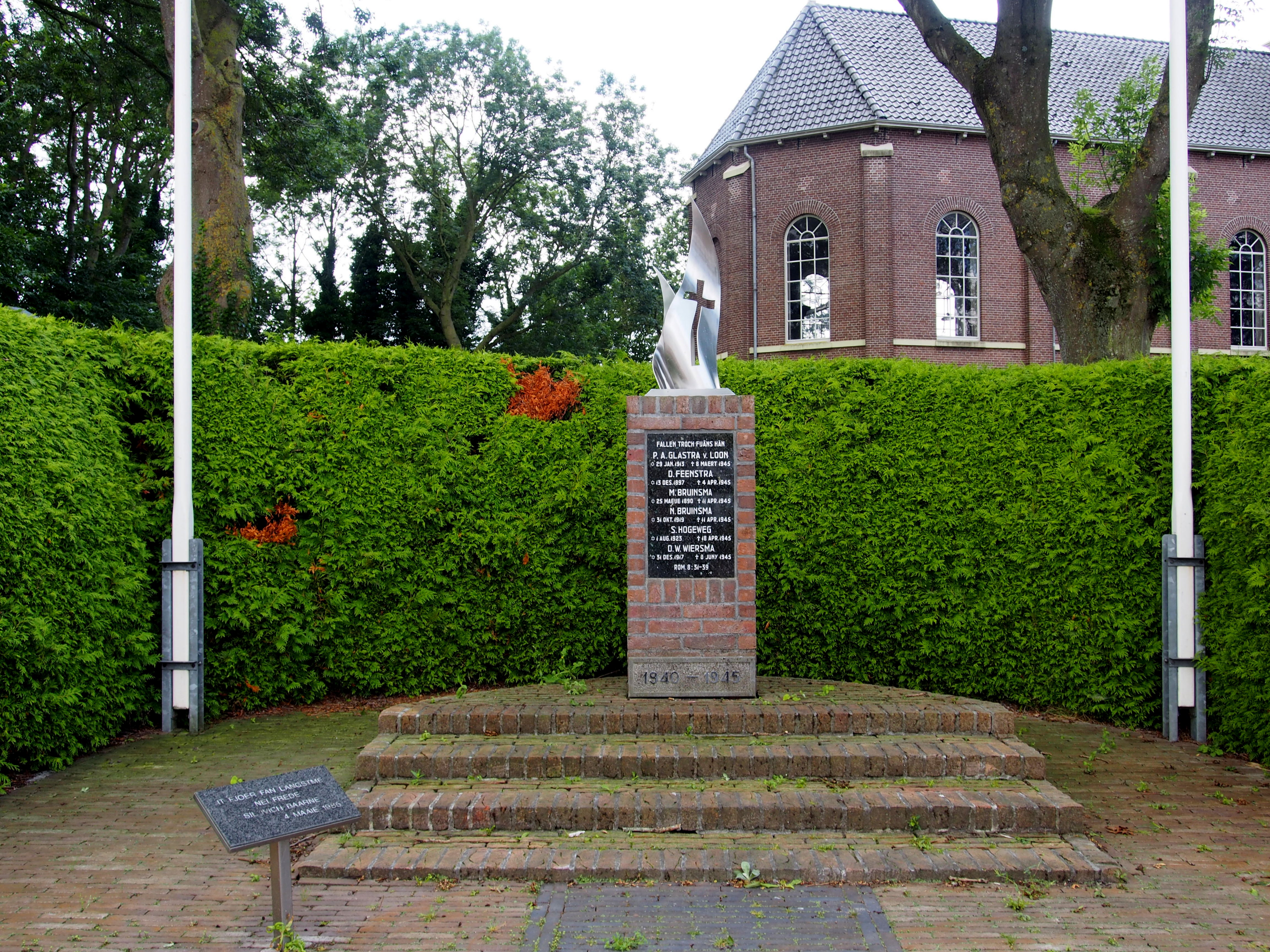 Oorlogs monument bij de Martenskerk (Scharnegoutum)